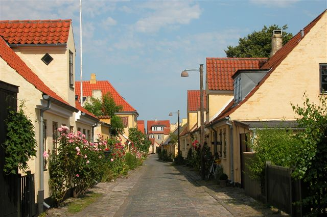 Dragør, Amager, Denmark